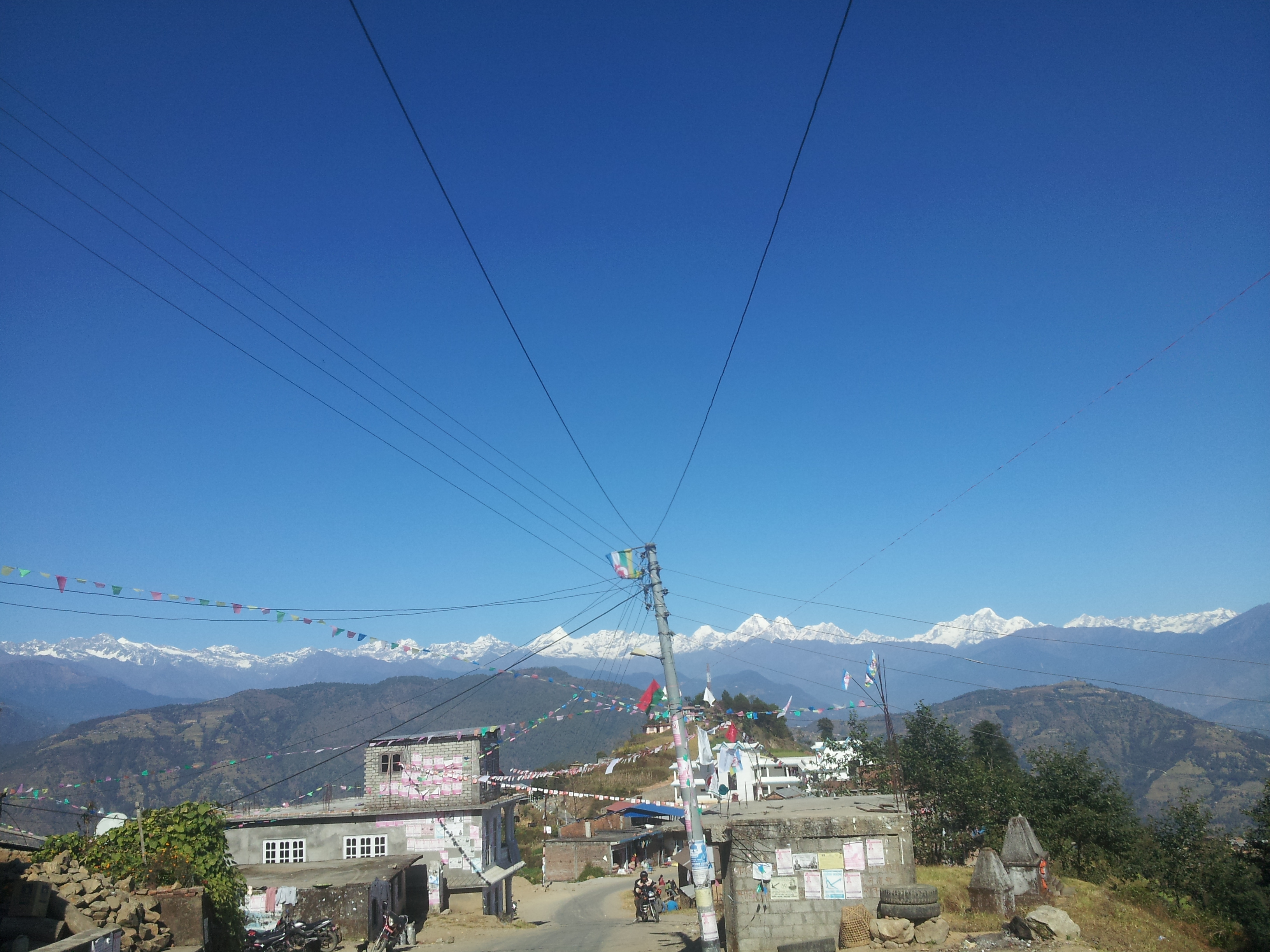 Bhotechaur